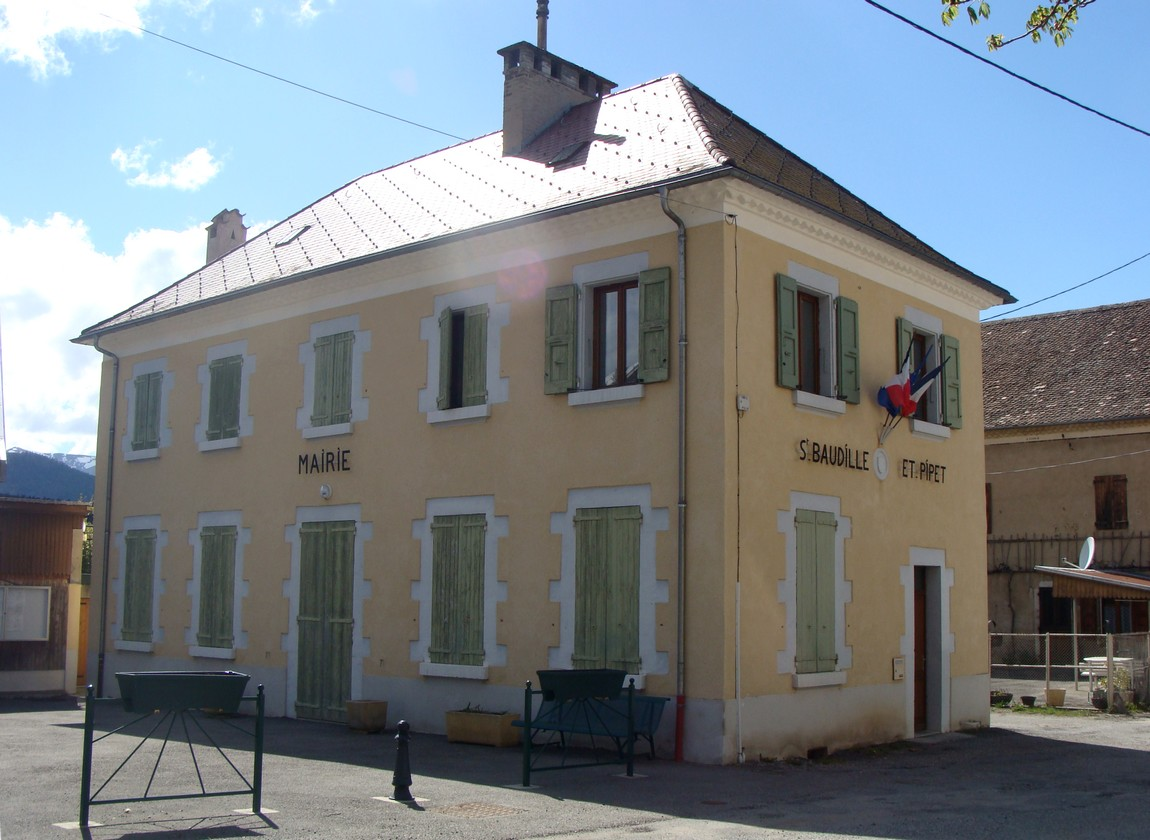 La mairie de Saint-Baudille-et-Pipet (Isère).